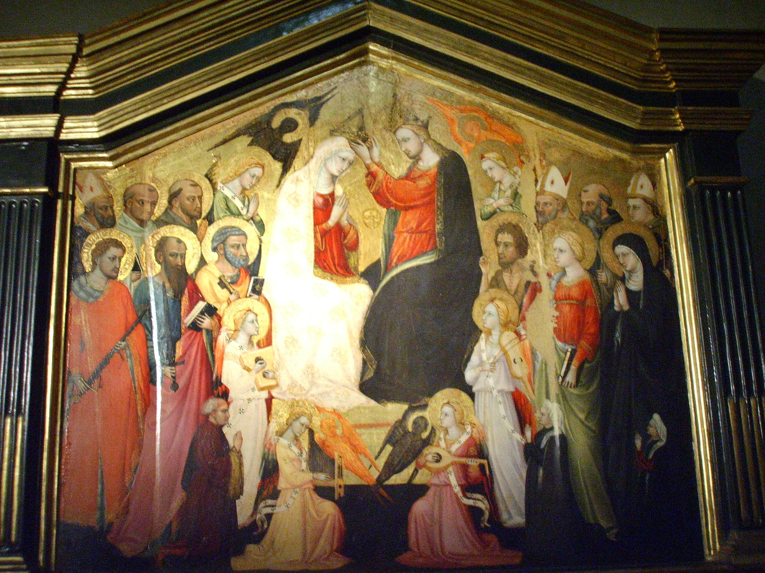 Santa Trinita (Firenze), Bicci di Lorenzo, Incoronazione della Vergine (1430).